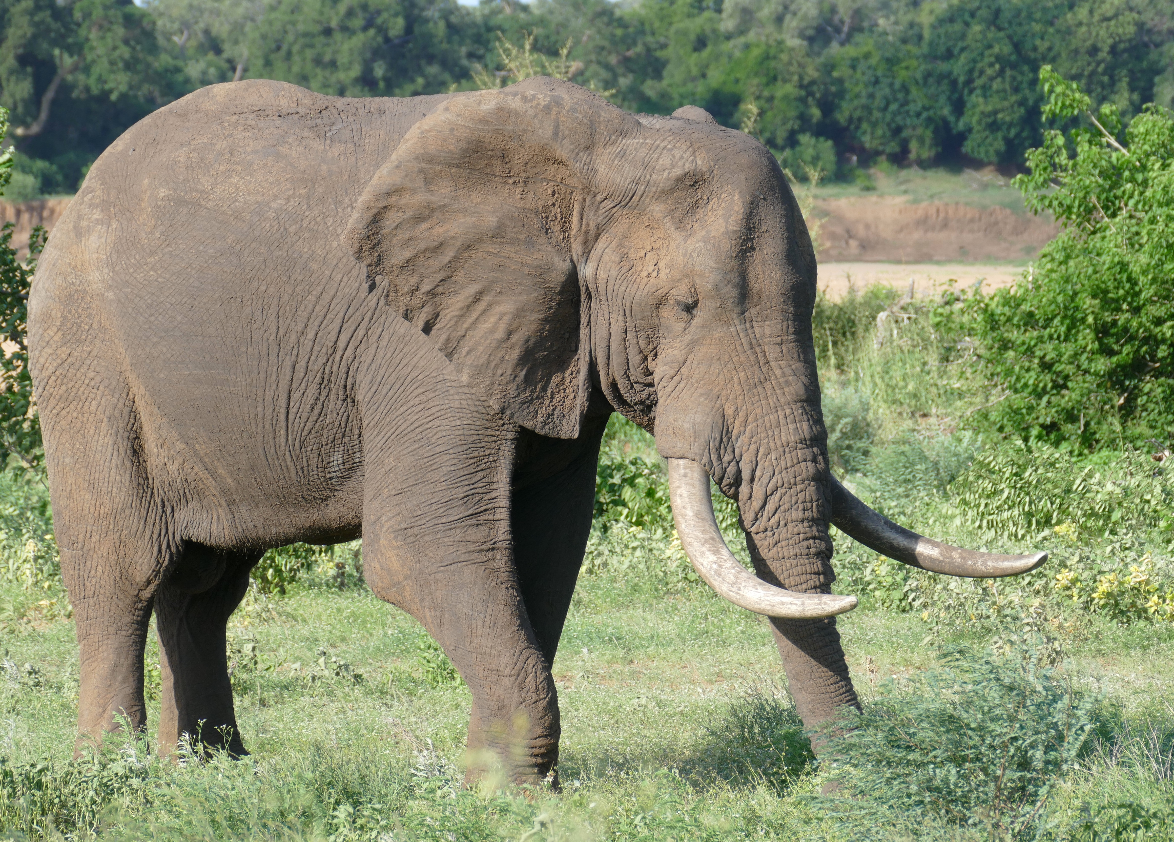 Letaba area, Kruger NP, Mpumalanga, SOUTH AFRICA